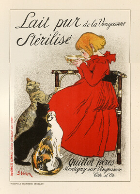 Affiche pour le "Lait pur stérilisé de la Vingeanne".